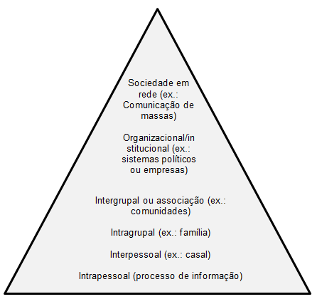 Pirámide da comunicação no processo da comunicação visual na perspectiva do teórico Denis McQuail.